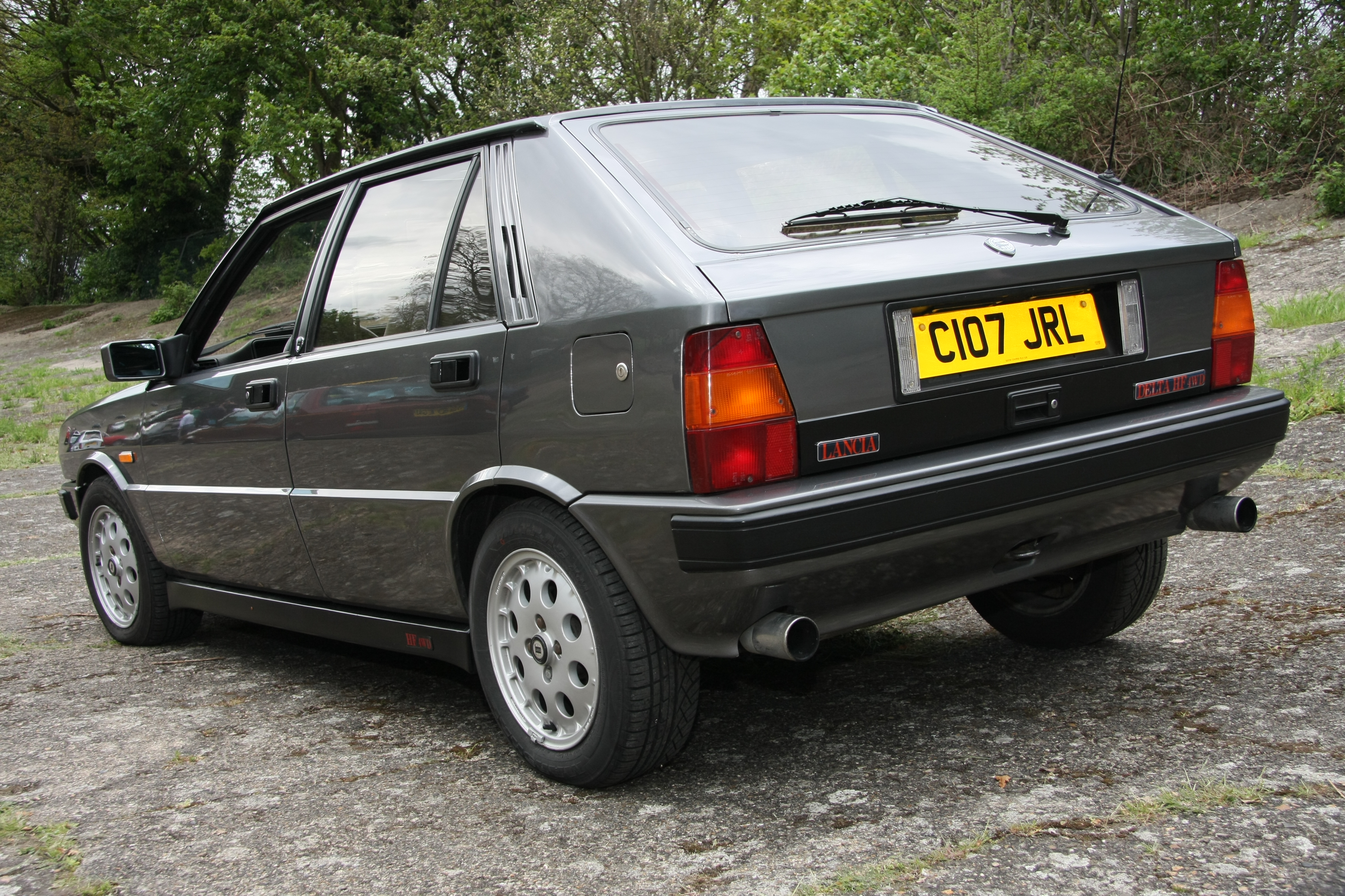 Auto Italia Spring car day Brooklands May 2010